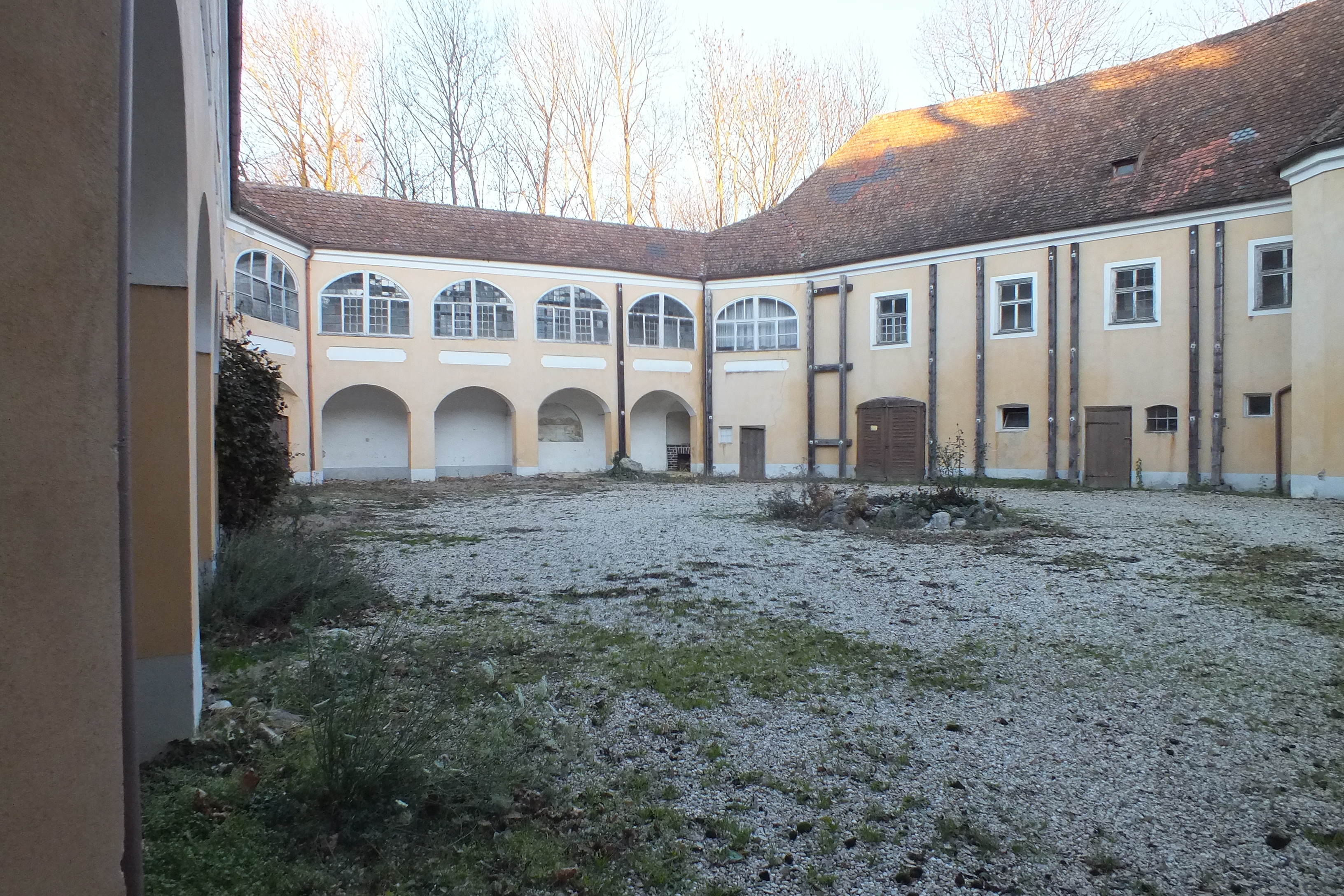 Arkadenhof Schloss Geltolfing